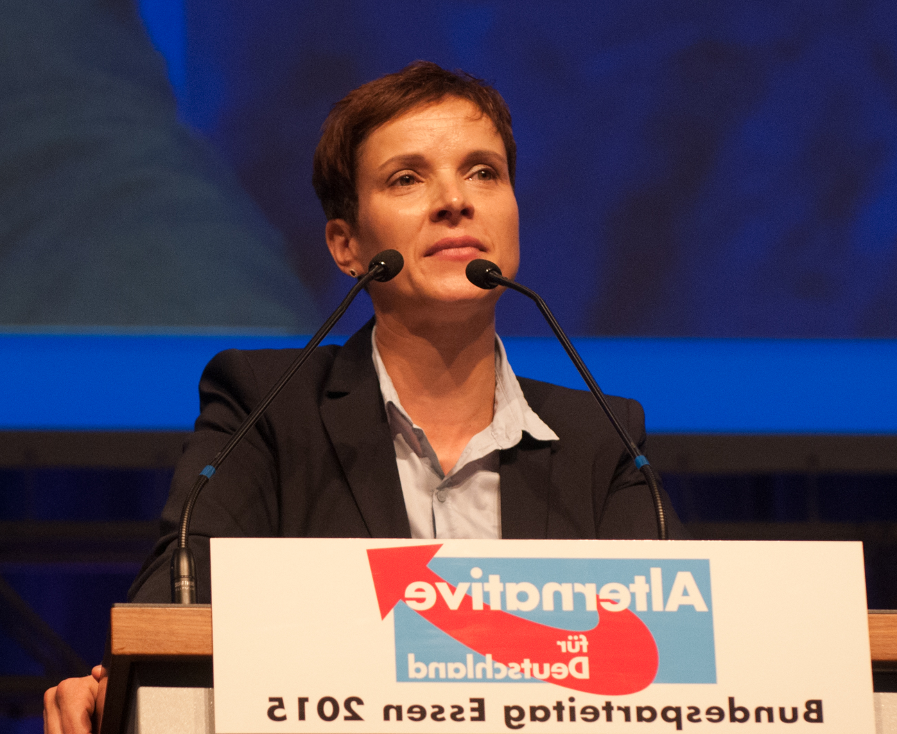 a.o. Bundesparteitag der Alternative für Deutschland, 4. Juli 2015 in Essen, Gruga Halle a.o. Bundesparteitag der Alternative für Deutschland am 4./5. Juli 2015 in Essen, Gruga Halle